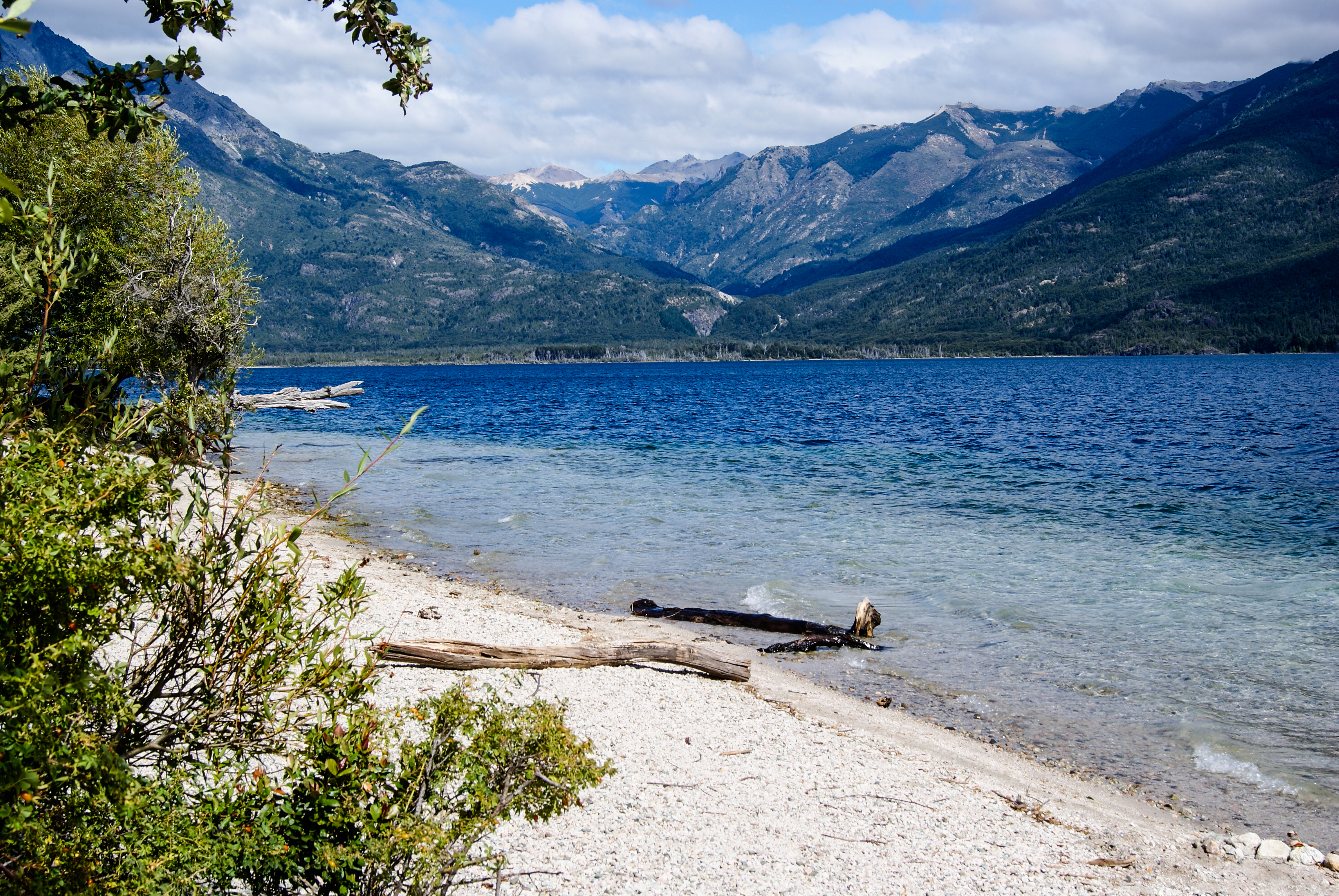 La transparente y profundo del sur Argentino